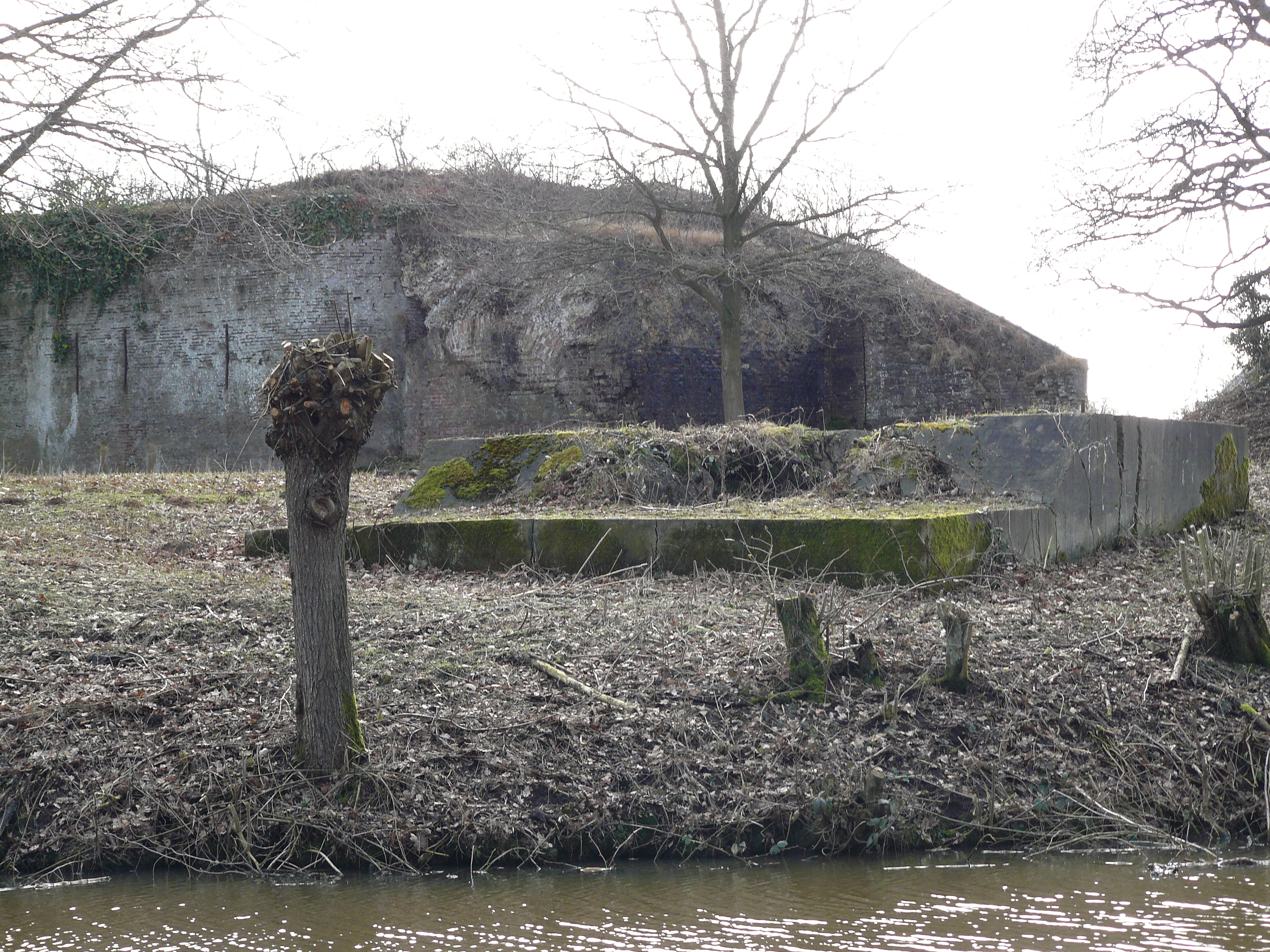 Medio jaren dertig van de 20e eeuw werd de linie versterkt. Op het forteiland kwam een koepelkazamat, voor of ten oosten van het bomvrije gebouw A. Tijdens de oorlog is het staal van de kazemat door de Duitsers verwijderd en resteert alleen de betonnen behuizing. Op de achtergrond de frontzijde van het bomvrije gebouw A.